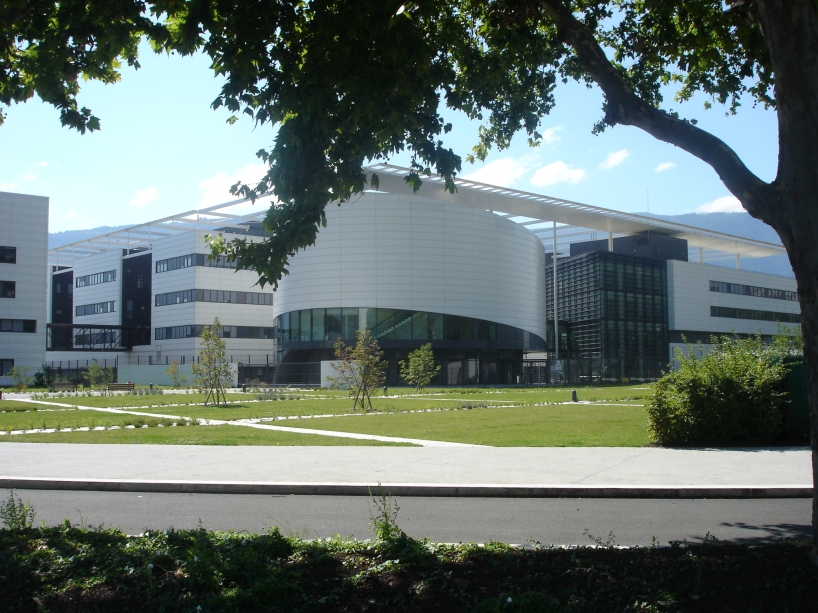 MINATEC : Micro et Nano Technologies, (recherche, enseignement et production)